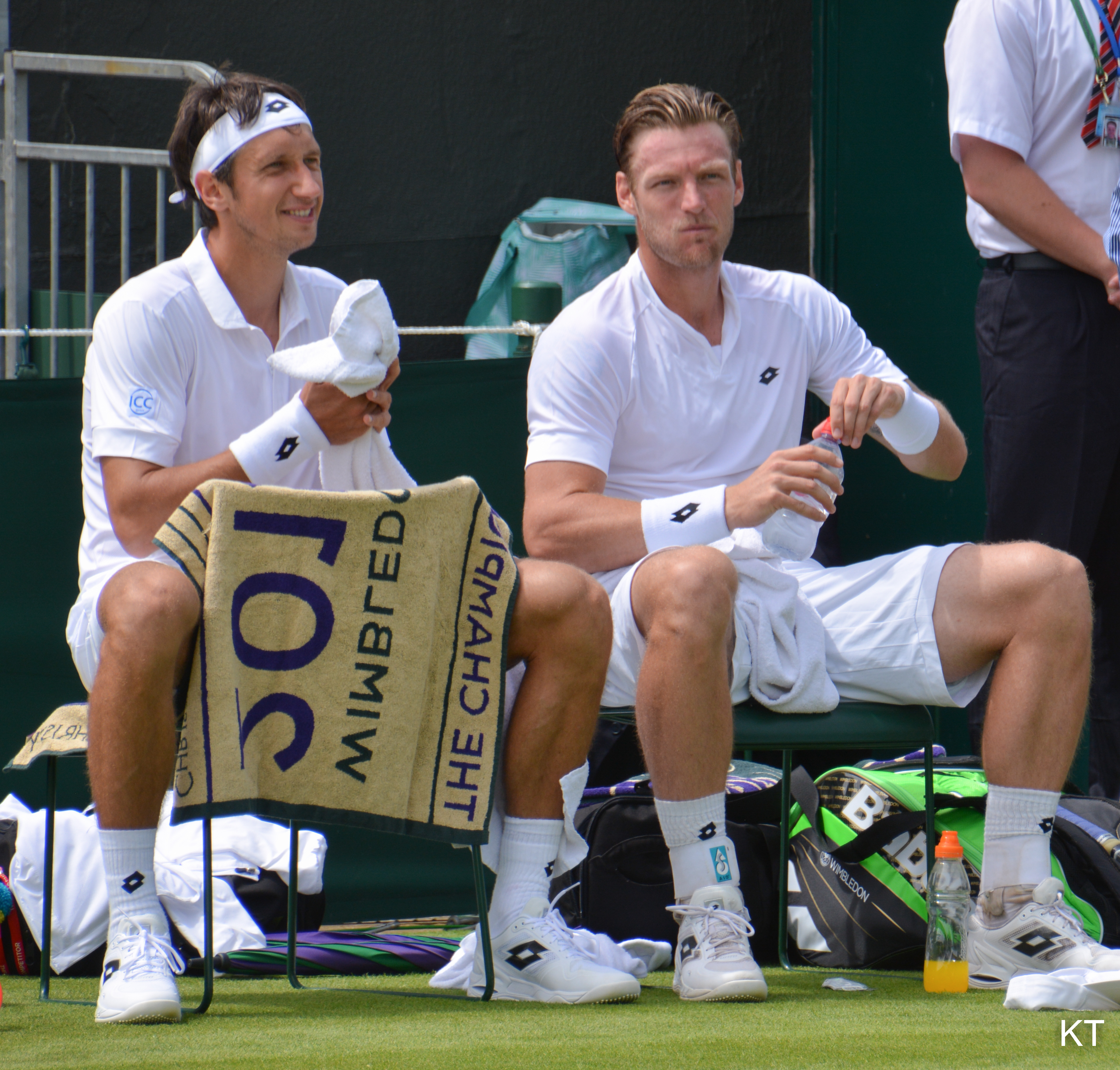 Stakhovsky & Groth